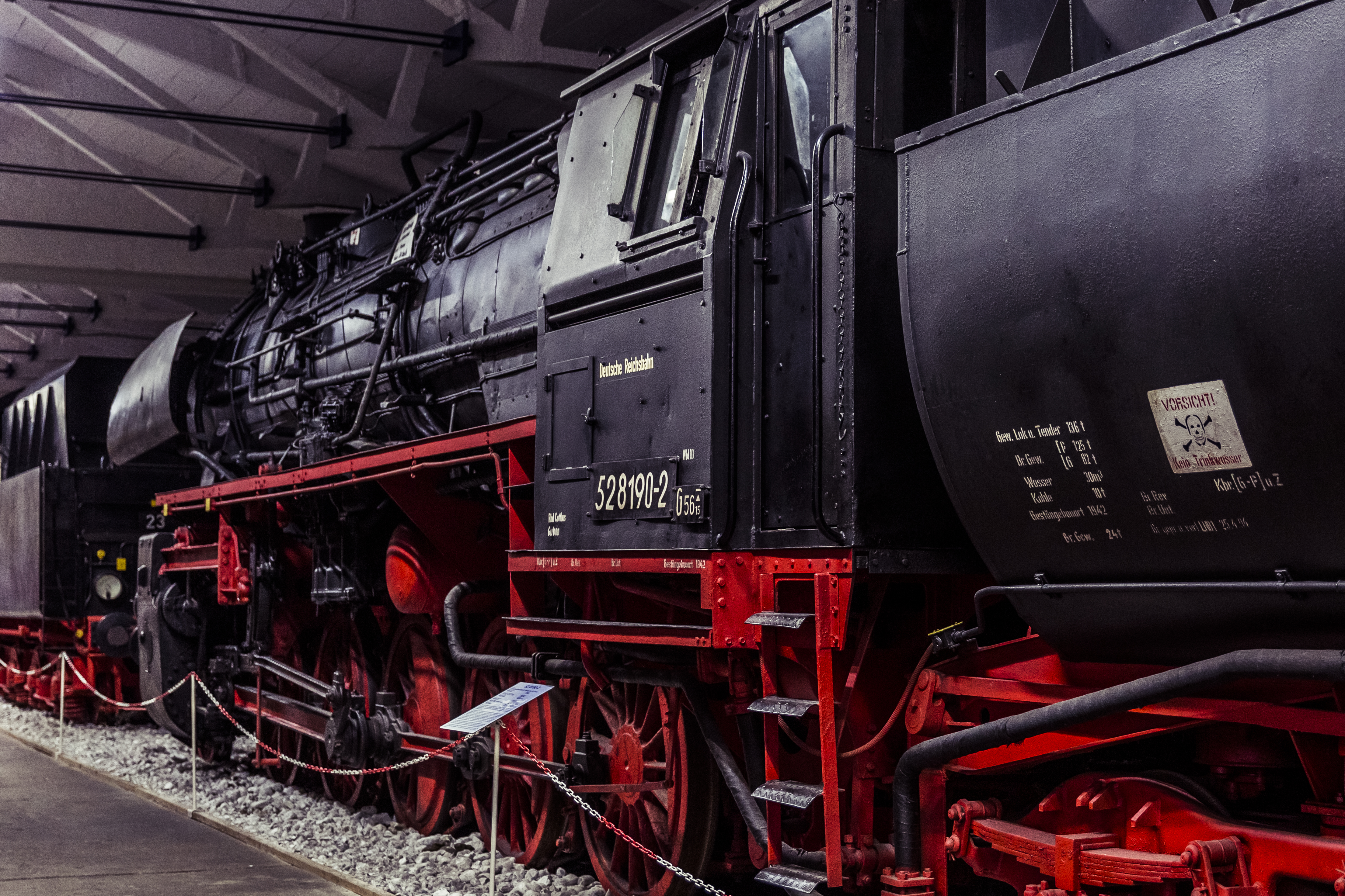 Größte Dampflok Europas